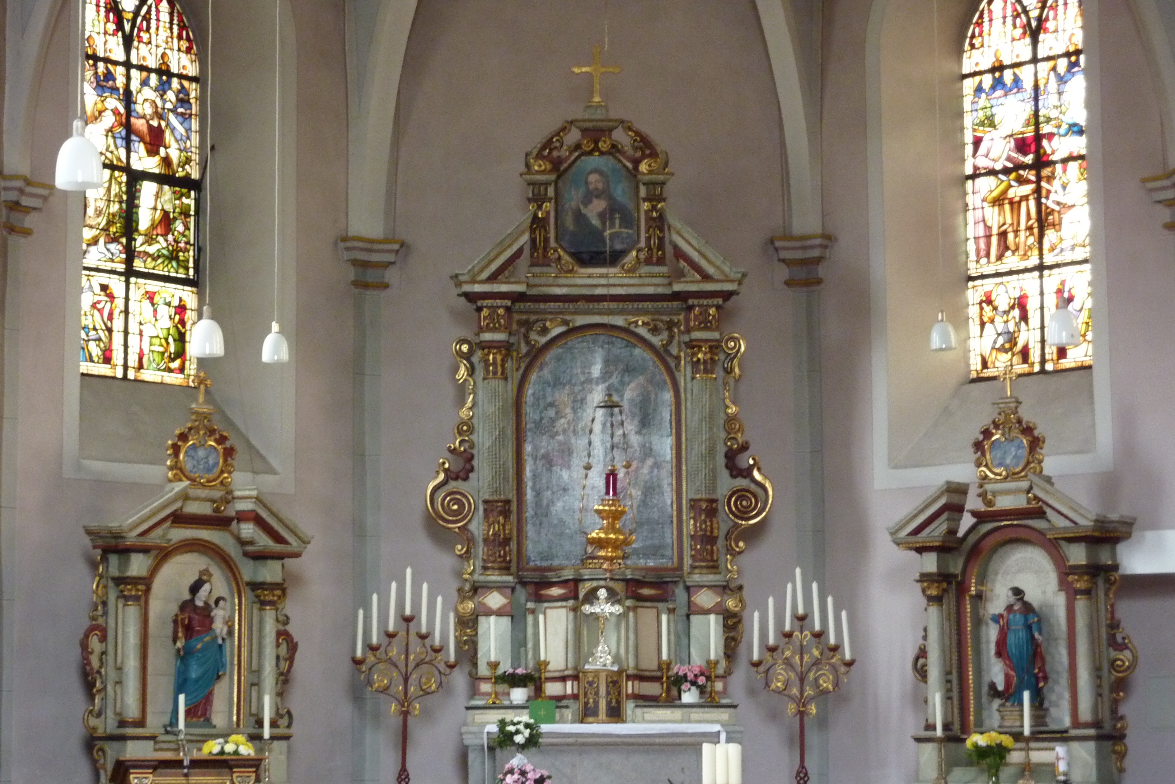 katholische Pfarrkirche St. Margareta in Adendorf, Ansicht des Chors